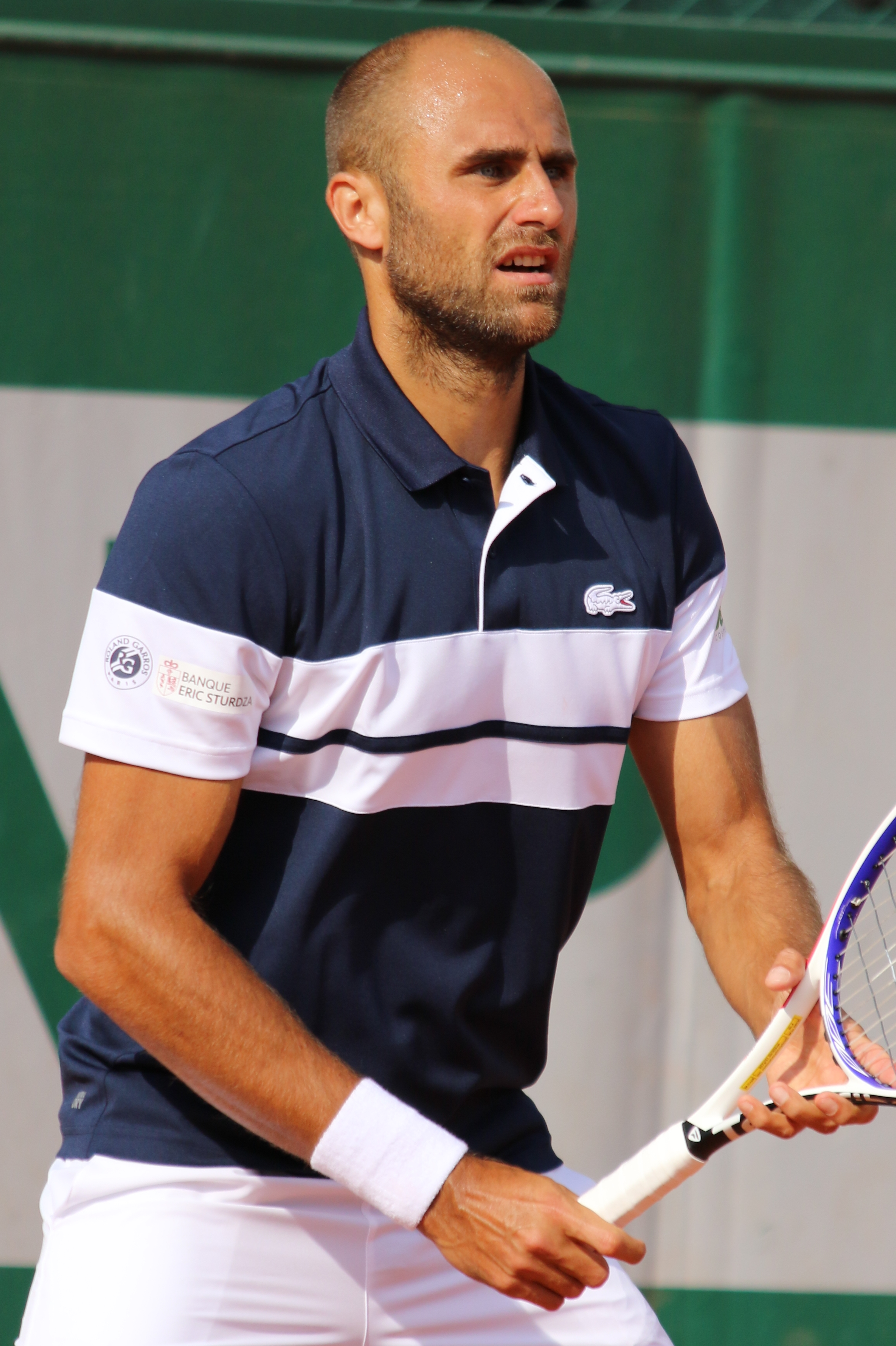 Copil RG19 (11)